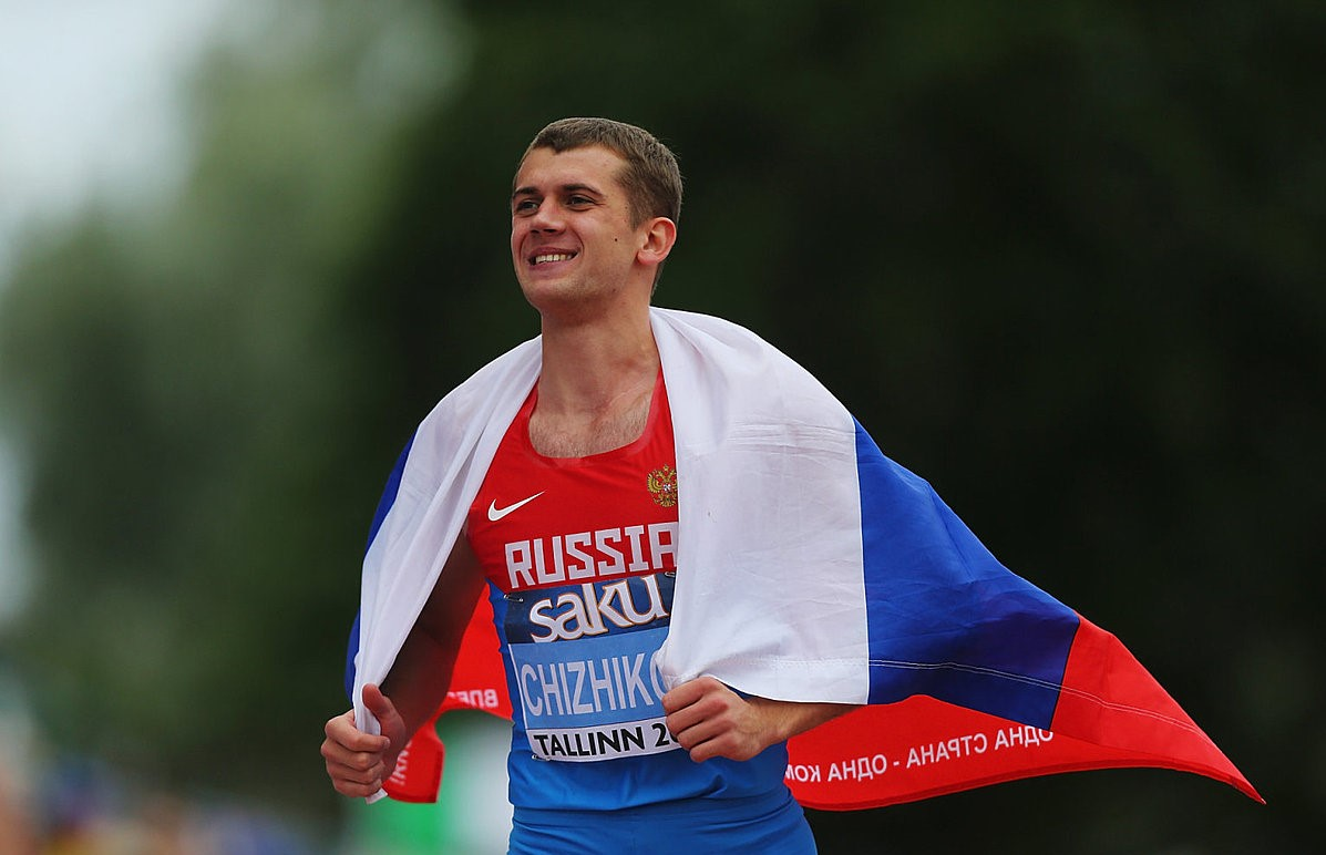 Чемпион Европы. Чемпион России. Неоднократный призер Чемпионата России.